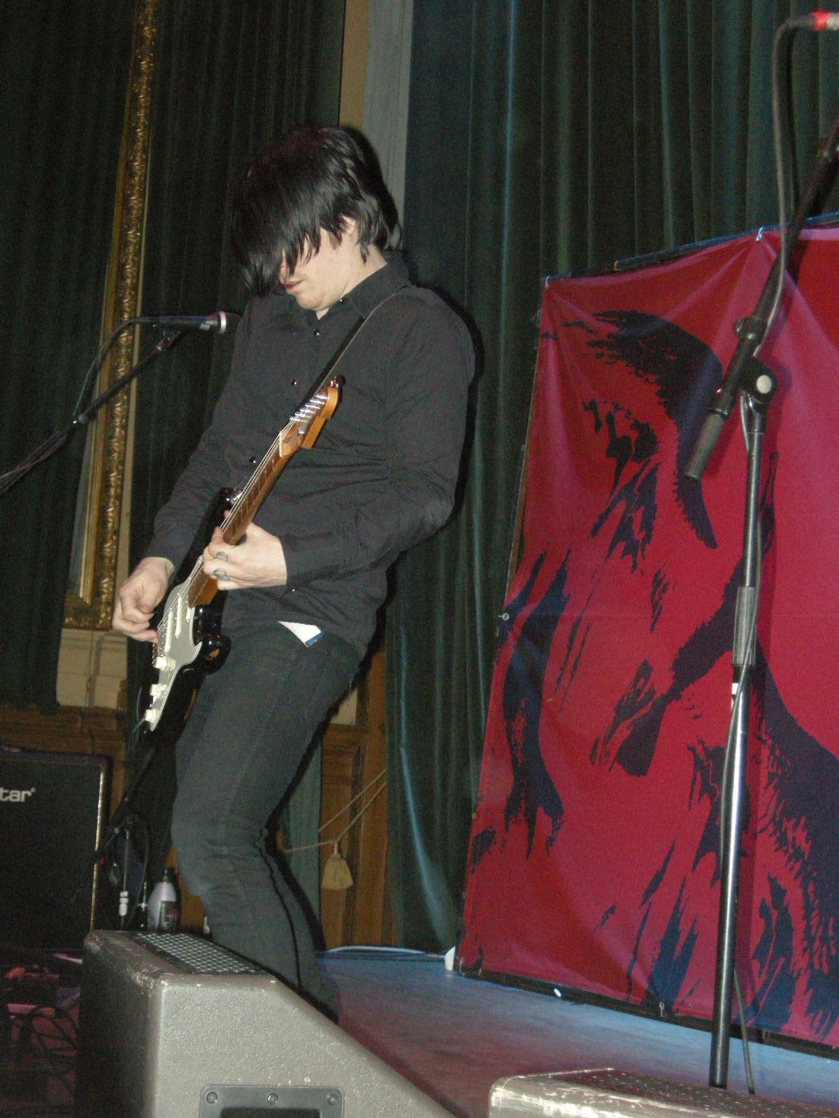 Pontus Andersson, gitarrist Dia Psalma, Nalen Stockholm